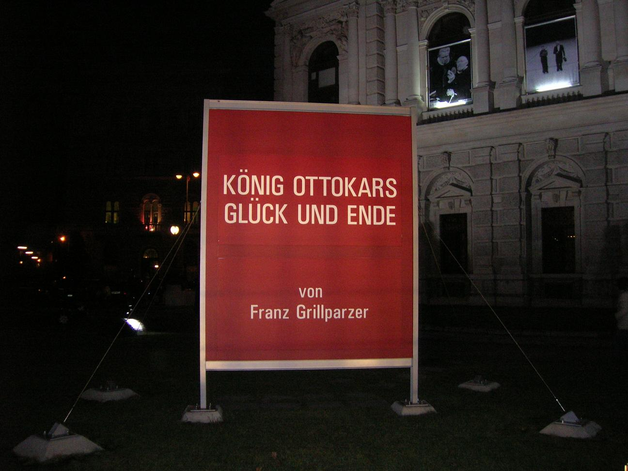 Tafel vor dem Burgtheater